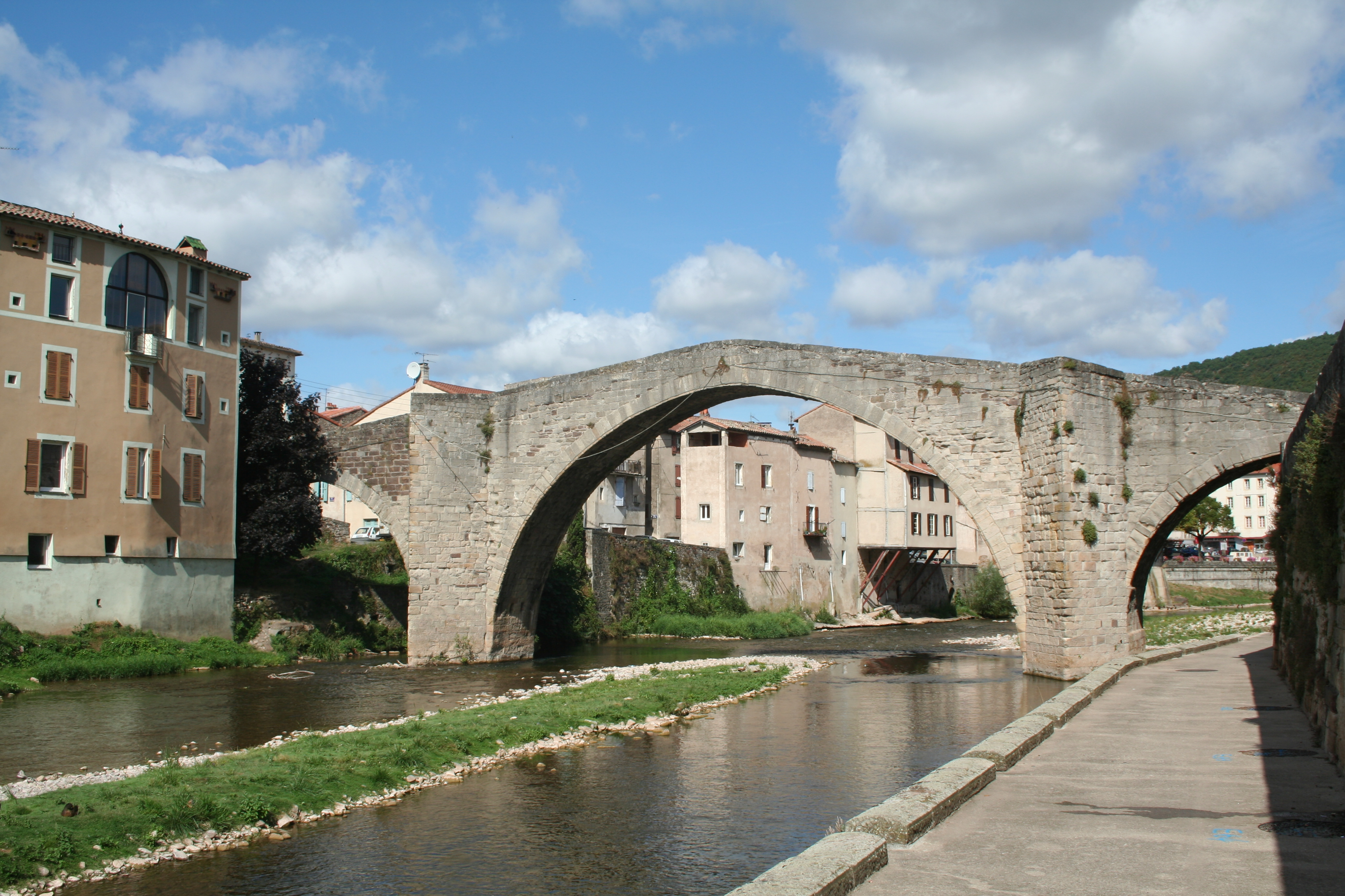 Saint-Affrique (Aveyron, France) - pont vieux sur la Sorgues.